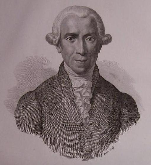 L'economista Giuseppe Palmieri Pubblicazione: Milano, Borroni e Scotti, 1855-1858